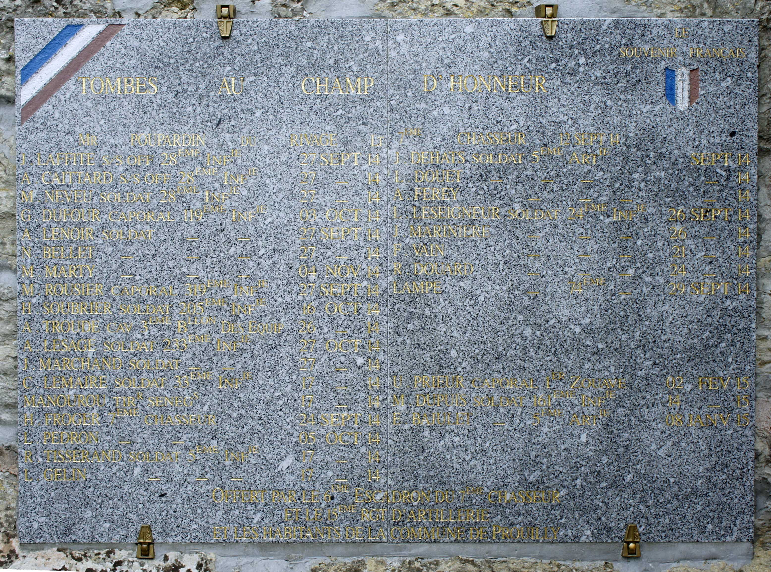 Monument aux morts sur l'église de Prouilly. Poupardin du Rivage, Laffite, Gaittard, Neveu, Dufour, Lenoir, Bellet, Marty, Roussier, Soubrier, Troude, Lesage, Marchand, Lemaire, Manourou, Froger, Pedron, Tisserand, Gelin, Dehats, Douet, Ferey, Leseigneur, Mariniere, Vain, Douard, Lampe, Prieur, Dupuis, Baiulet, se sont les noms des soldats inscrits sur cette stèle offerte par les habitants et le 6e escadron du 7e régiment de chasseurs, le 15e régiment d'artillerie.